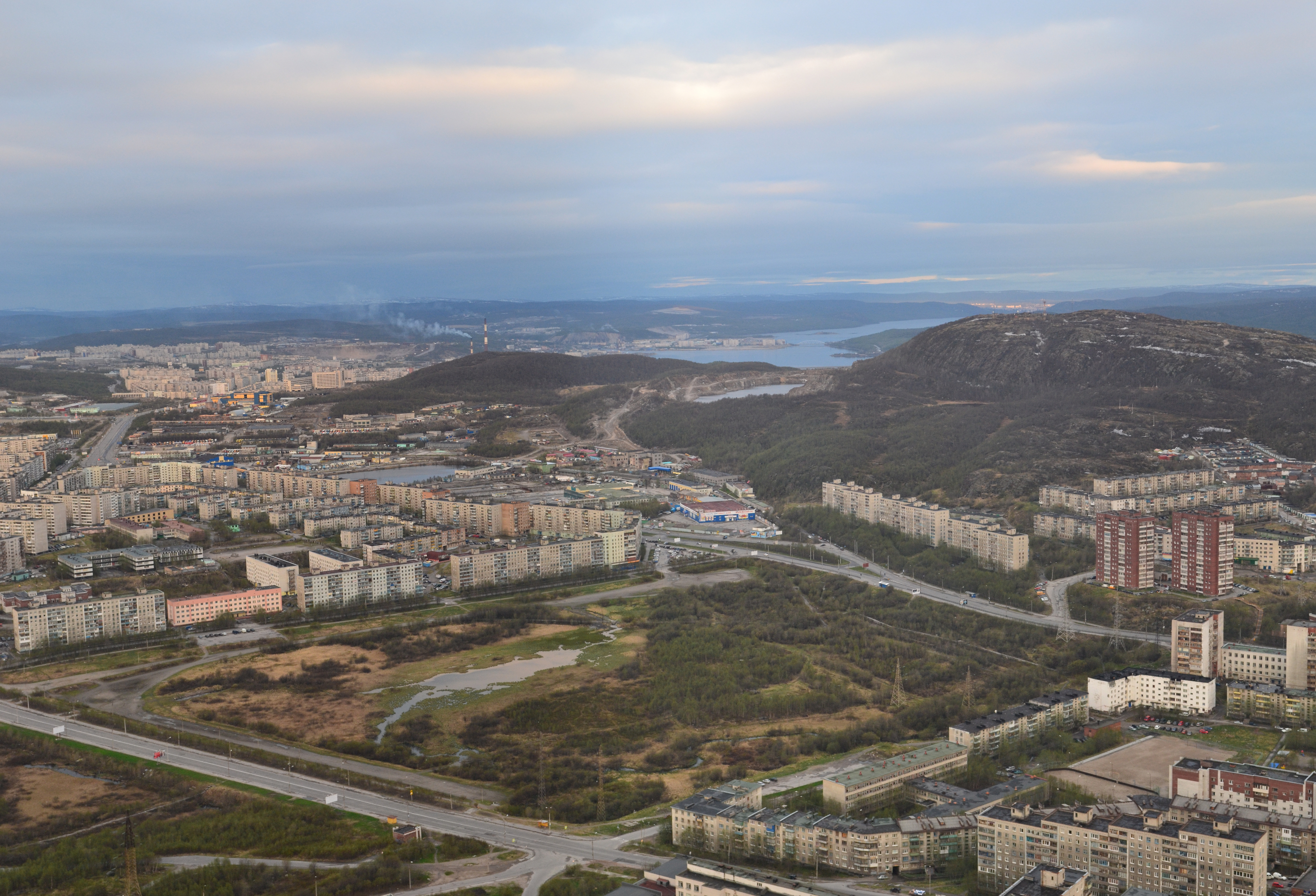 Вид на юг, июнь 2011 г.